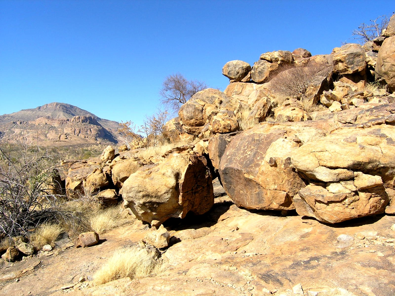 Zentral-Namib, Erongo-Gebirge